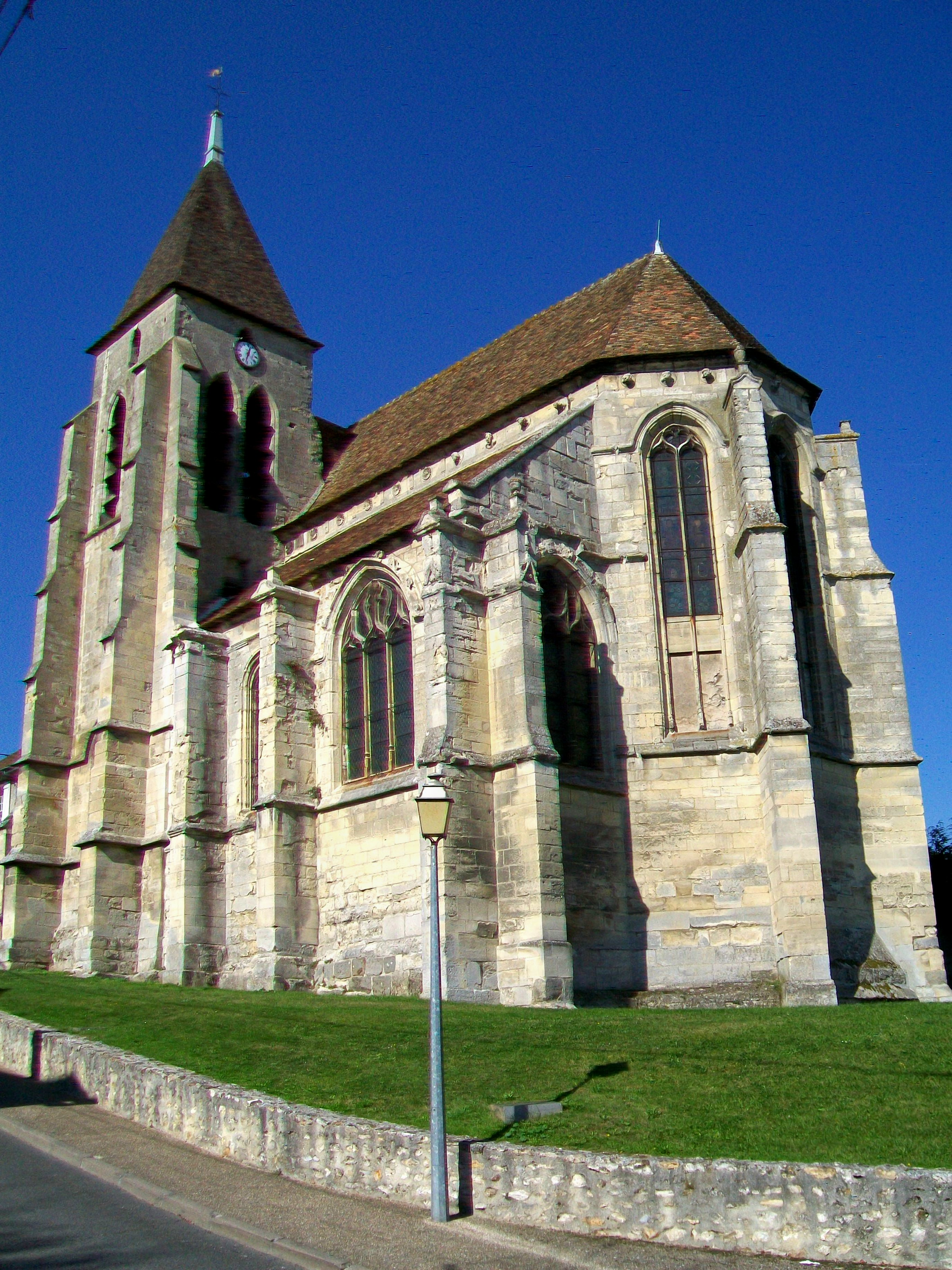 L'église Saint-Sulpice, depuis le sud-est.